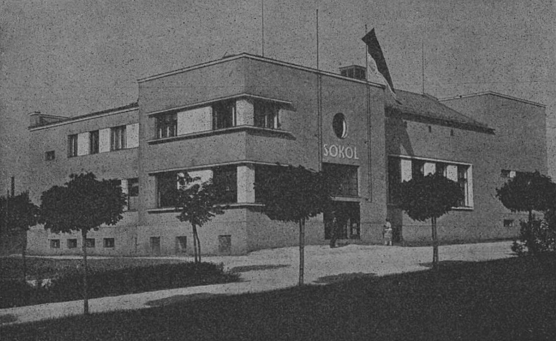 Stará fotografie Sokolovny v Kopřivnici